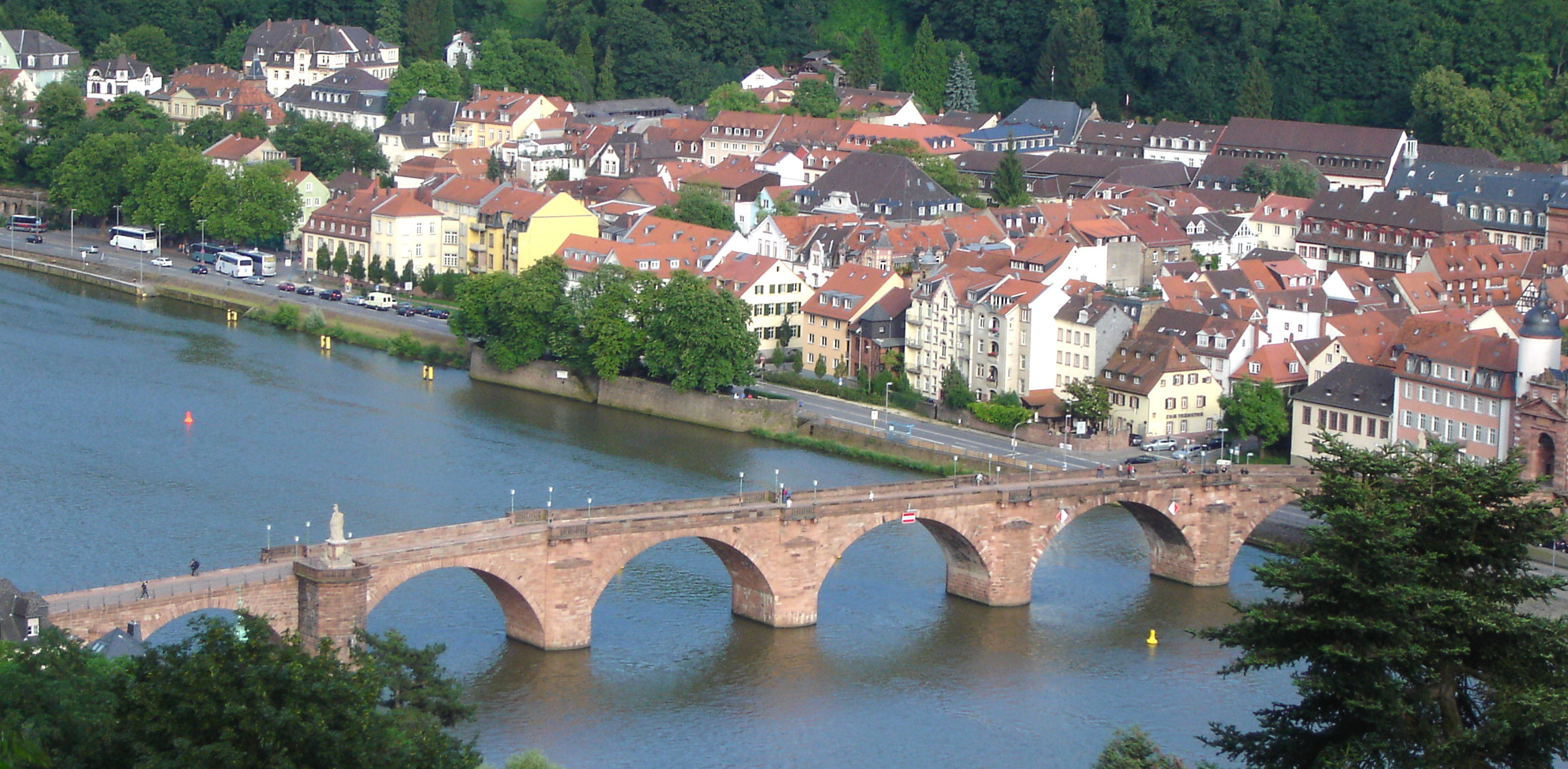 deutsch: Alte Brücke (Carl-Theodor-Brücke) in Heidelberg, vom Philosophenweg gesehen. english: "Old Bridge" (Alte Brücke or Carl-Theodor-Brücke) in Heidelberg, Germany, as seen from the Philosophers Walk (Philosophenweg).